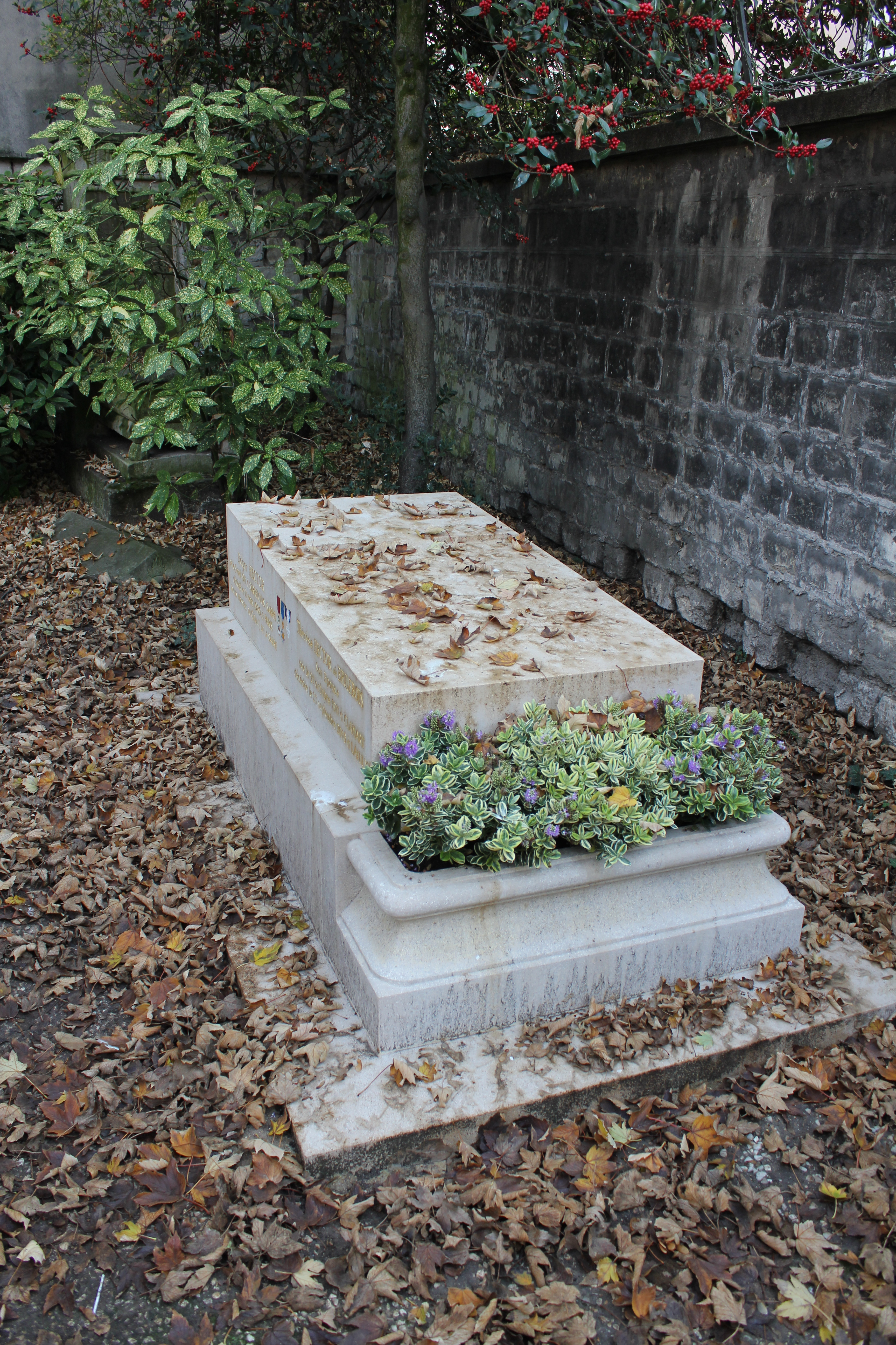 vue générale, face avant